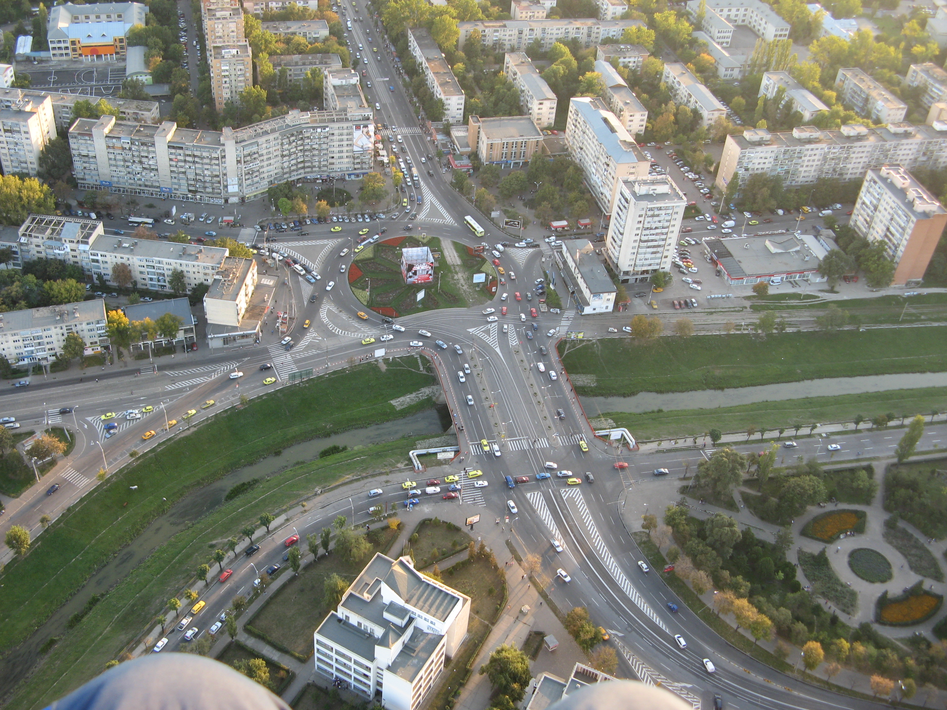 Iasi, aerial view Podul Ros (Red Bridge) , Iaşi,Romania